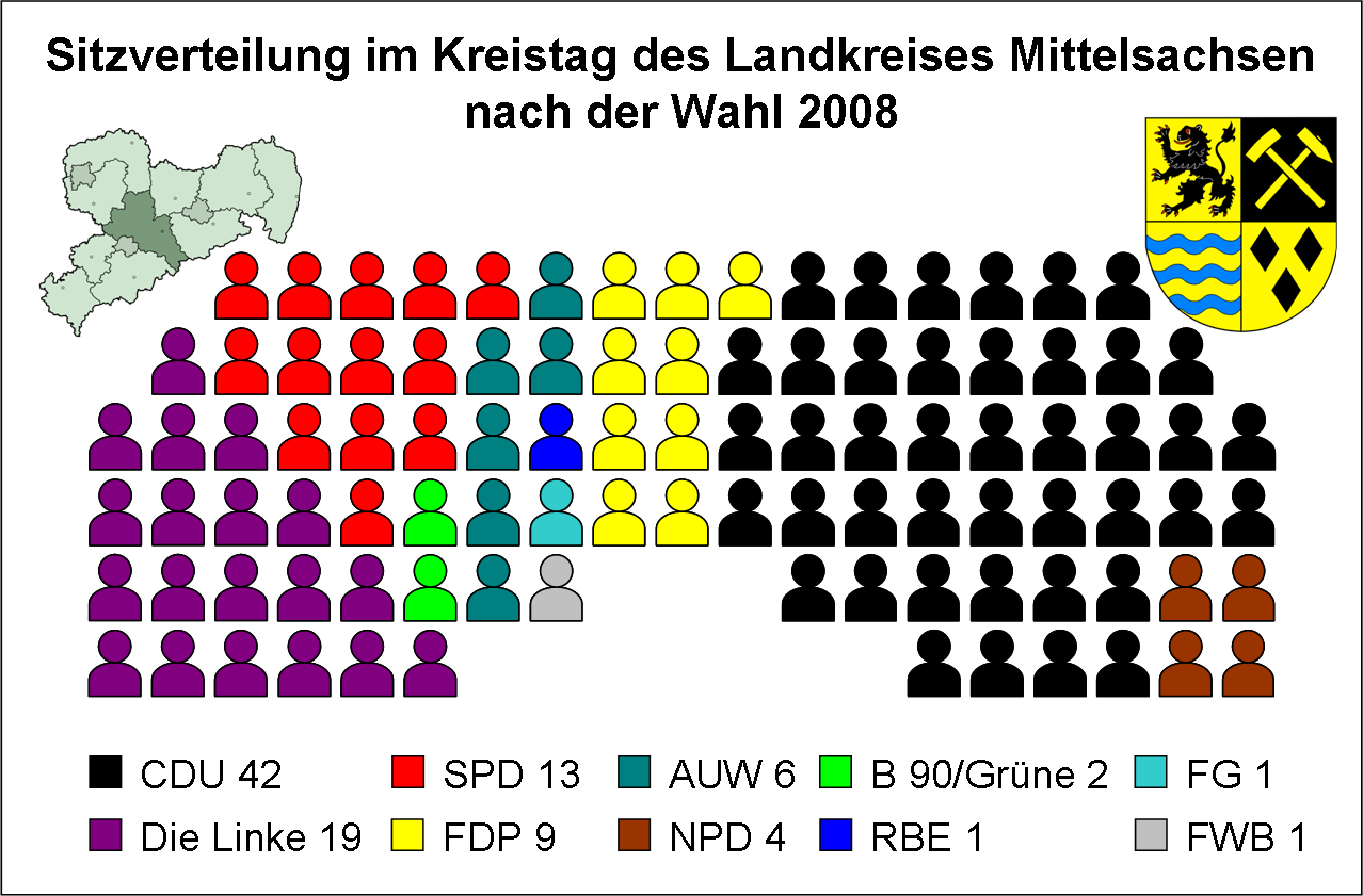 Sitzverteilung im Kreistag des Landkreises Mittelsachsen nach der Wahl vom 8. Juni 2008 CDU = Christlich Demokratische Union Die Linke = Die Linke SPD = Sozialdemokratische Partei Deutschlands FDP = Freie Demokratische Partei AUW = Allianz unabhängiger Wähler e.V. NPD = Nationaldemokratische Partei Deutschlands B90/Grüne = Bündnis 90/Die Grünen RBE = Regionalbauernverband Erzgebirge e.V. FG = Freiberg kann mehr FWB = Freie Wählergemeinschaft Burgstädt e.V.